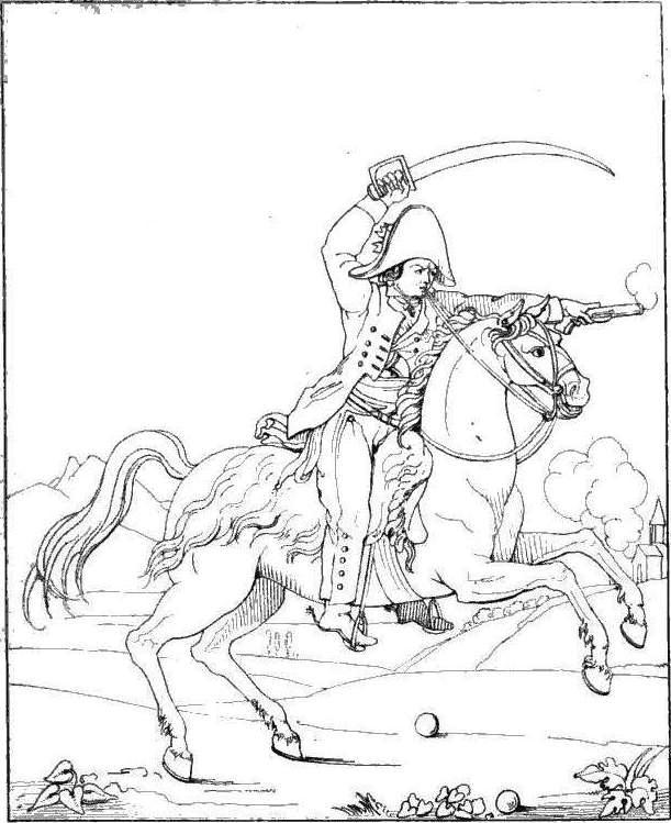 "Renée Bordereau dite Langevin, cavalier vendéen, née à Soulaine près d'Angers, en juin 1770."